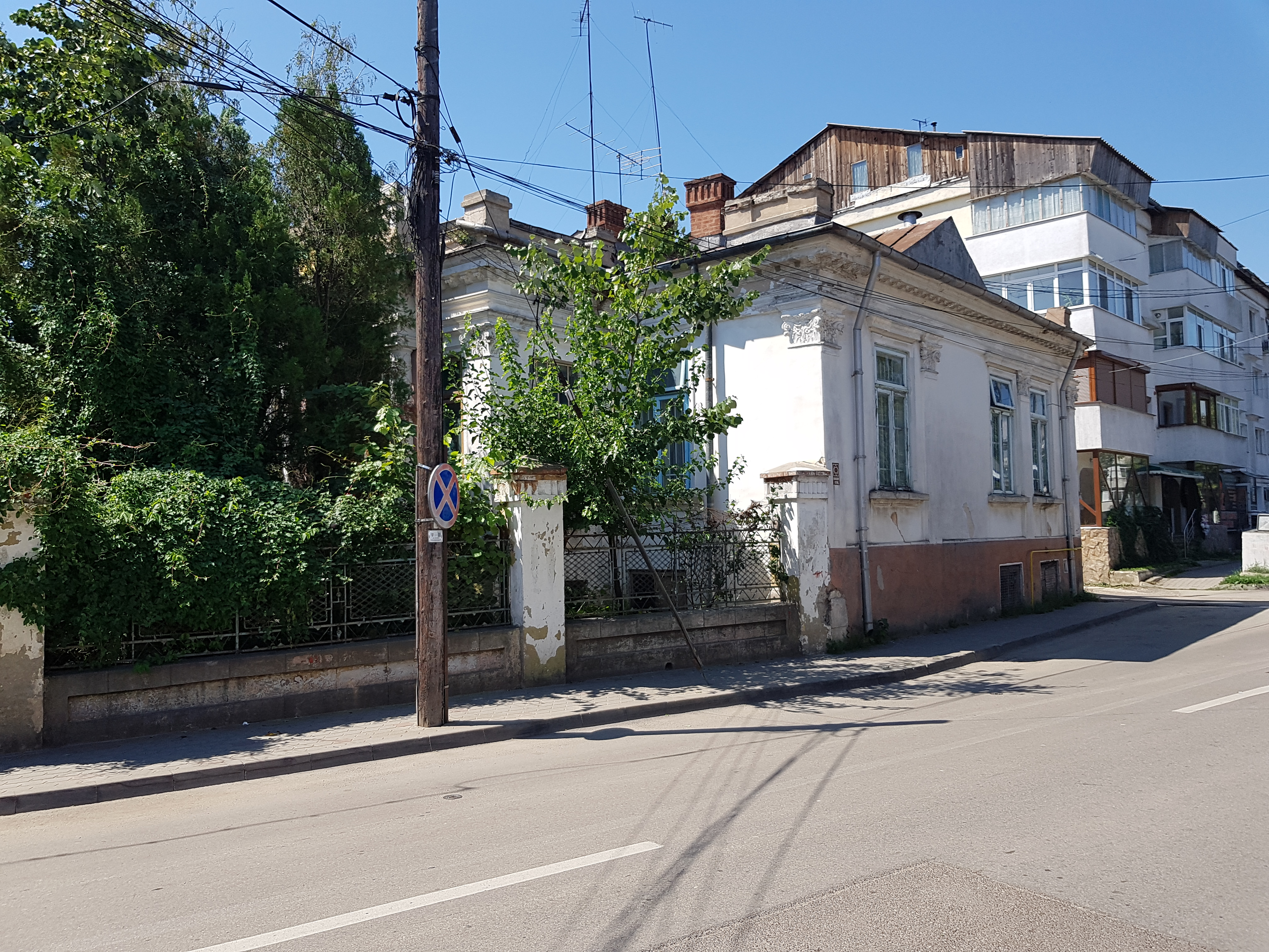 Casa Gheorghe Botez